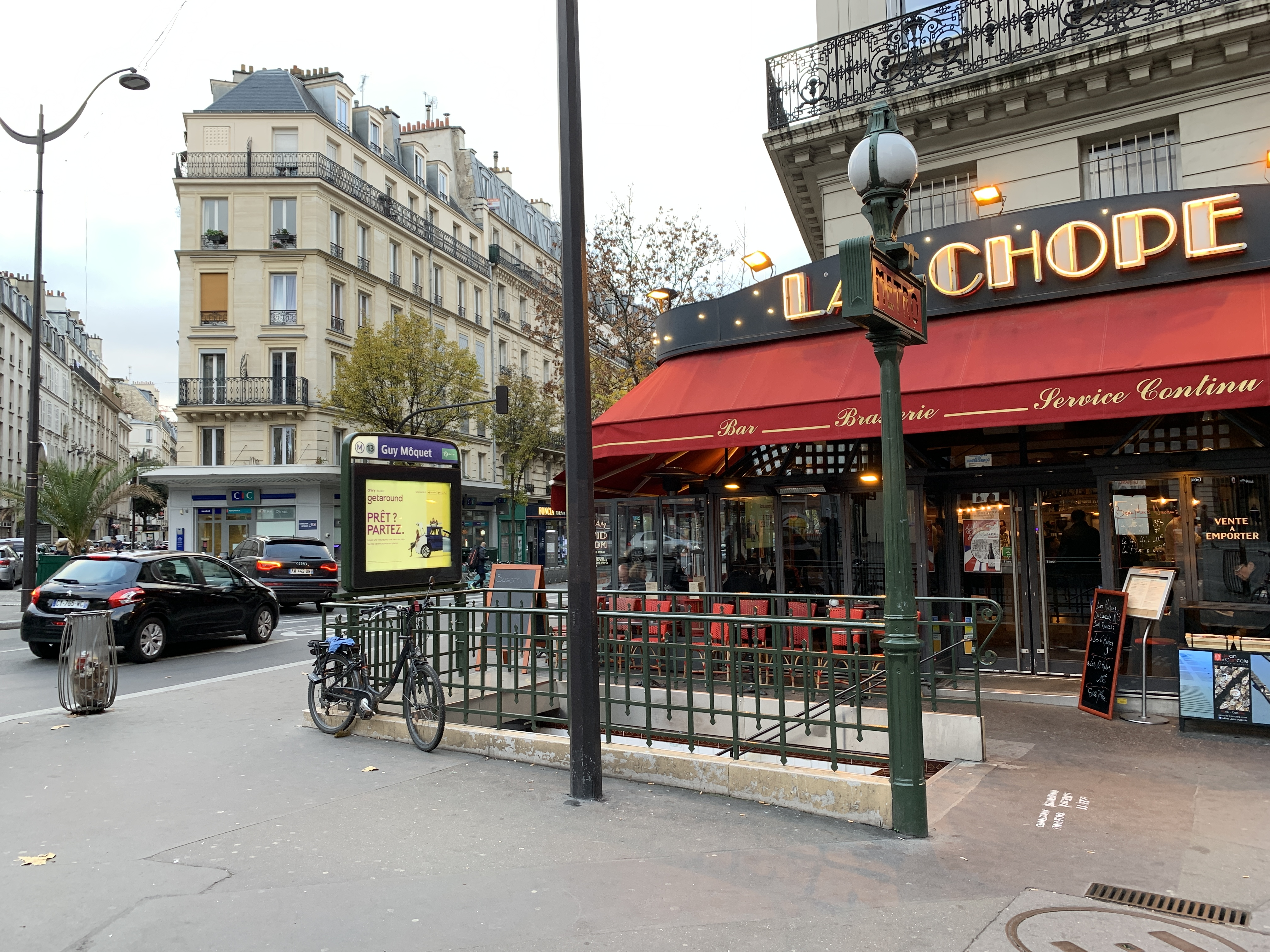 Entrée de la station de métro Guy Môquet, Paris.